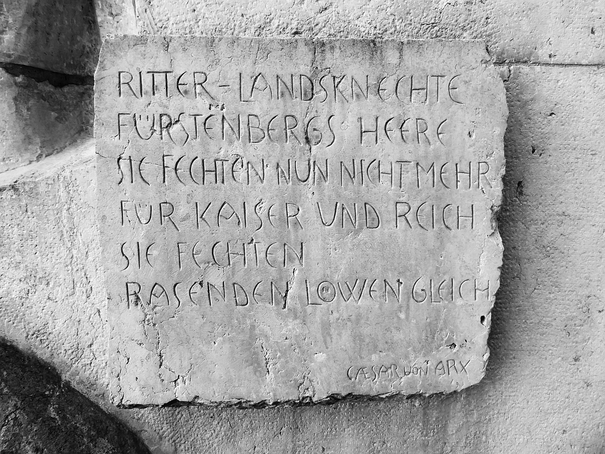 Schlacht bei Dornach vom 22. Juli 1499, Tafel-Inschrift von Jakob Probst (17. August 1880 in Reigoldswil, Basel-Landschaft; † 28. März 1966 in Vira, Tessin) Bildhauer